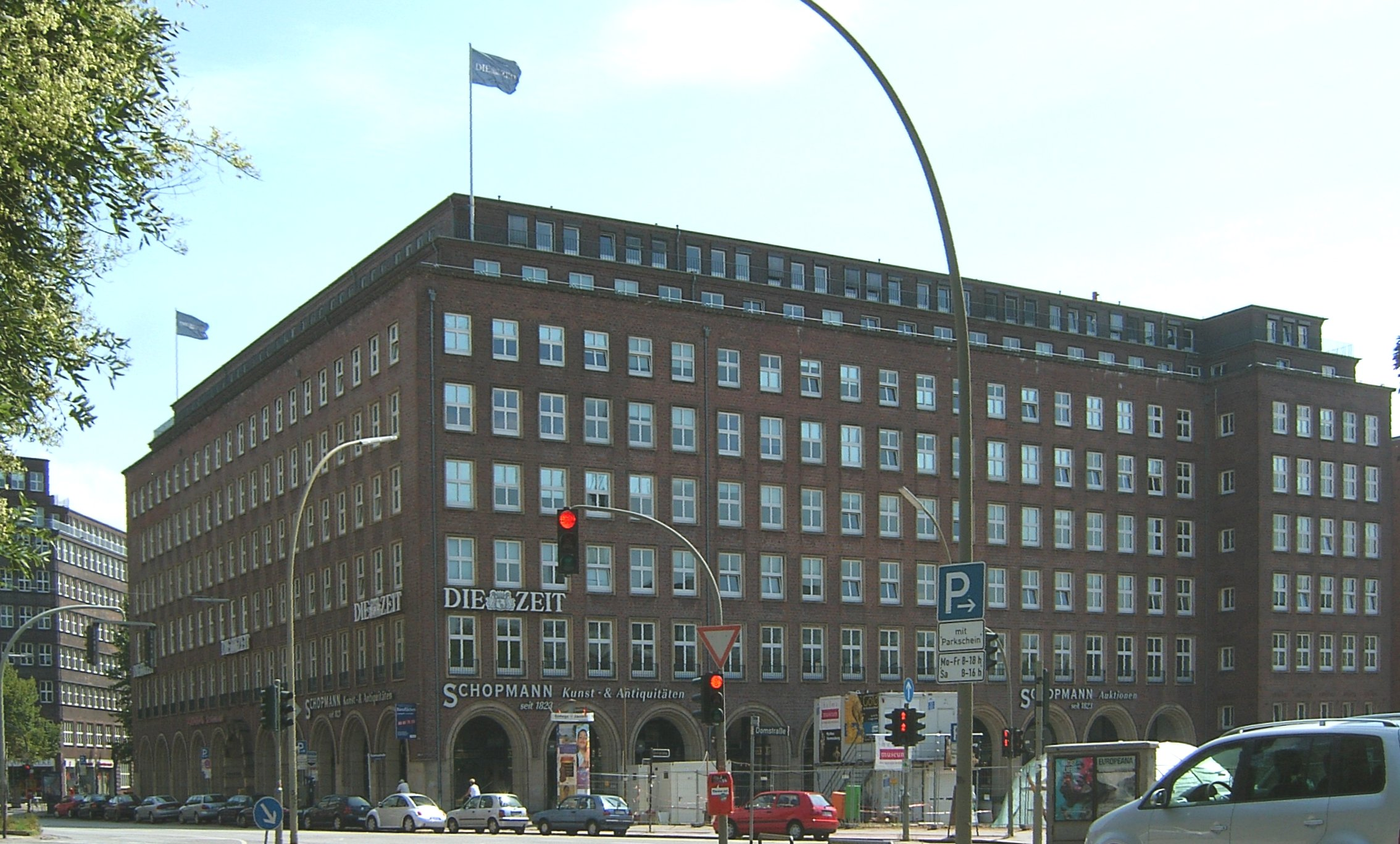 Das Pressehaus am Speersort 1 in Hamburg-Altstadt, 1938 nach Plänen von Rudolf Klophaus erbaut, diente zunächst dem nationalsozialistischen Hamburger Tageblatt. Nach dem Zweiten Weltkrieg hatten u.a. Der Spiegel und Der Stern ihre Redaktion. Heute nutzt die Wochenzeitung Die Zeit das Gebäude. Die Arkaden nehmen die Gestaltung des ehemals benachbarten Johanneums auf. This is a photograph of an architectural monument.